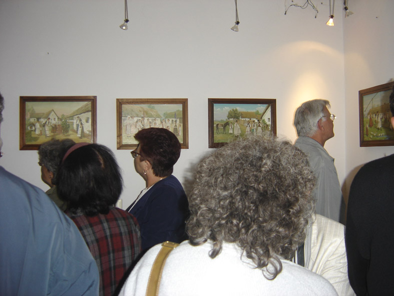 Klep, klep i šareno jaje, izložba,Osijek, IV/V. 2006.